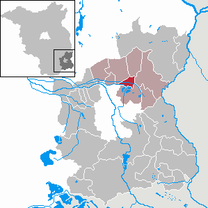 Peitz in Brandenburg (Country) - District Spree-Neiße